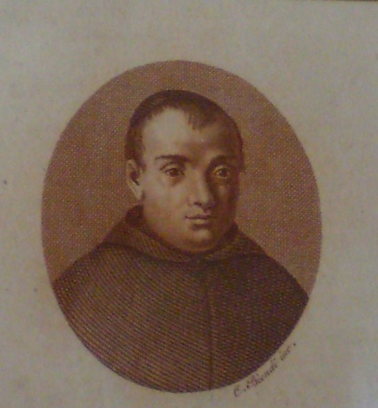 Stampa realizzata alla fine del 1800 riproducente il ritratto di Gherardo degli Angioli.